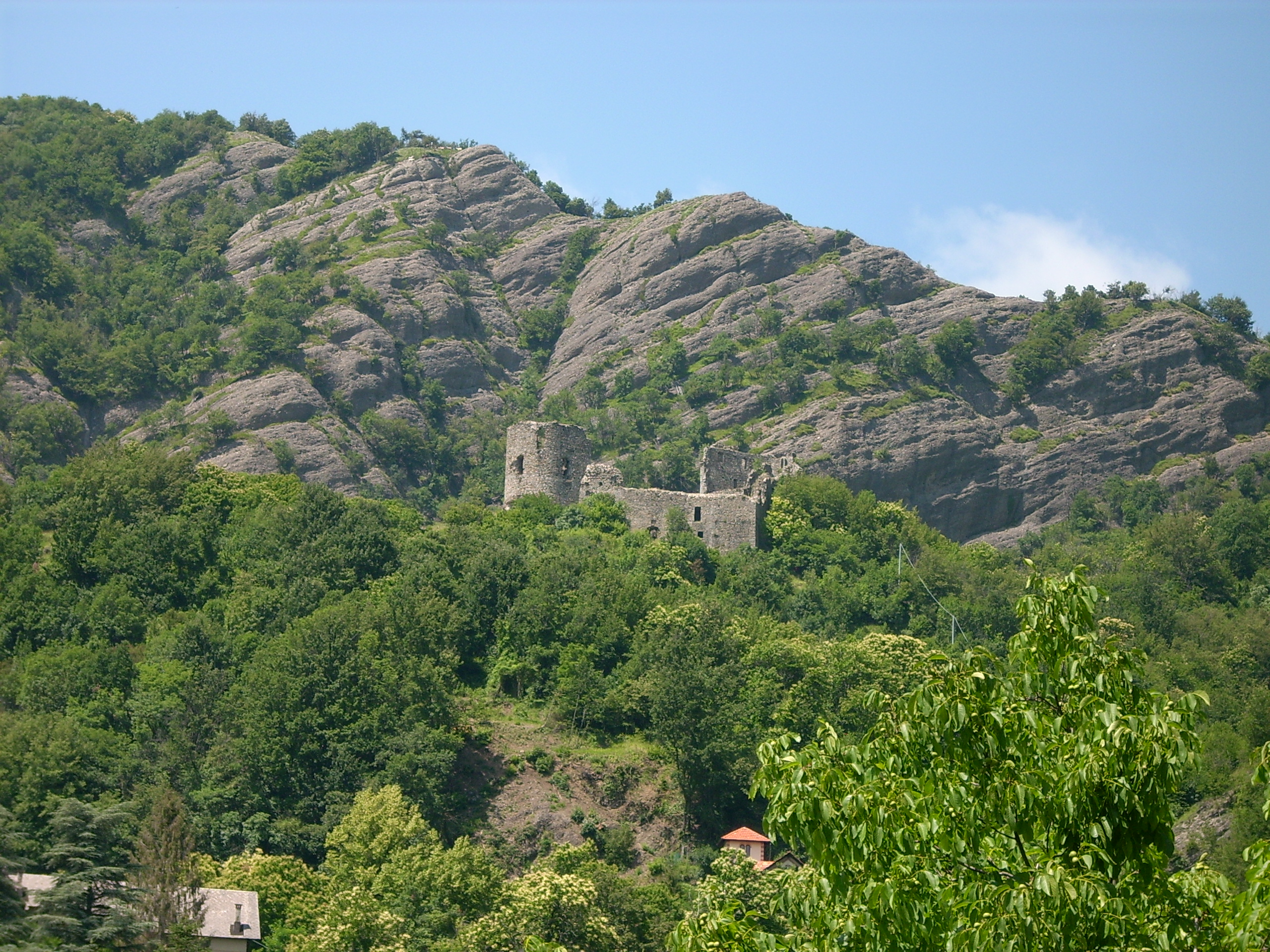 Castello dei Fieschi presso Savignone, Liguria, Italia